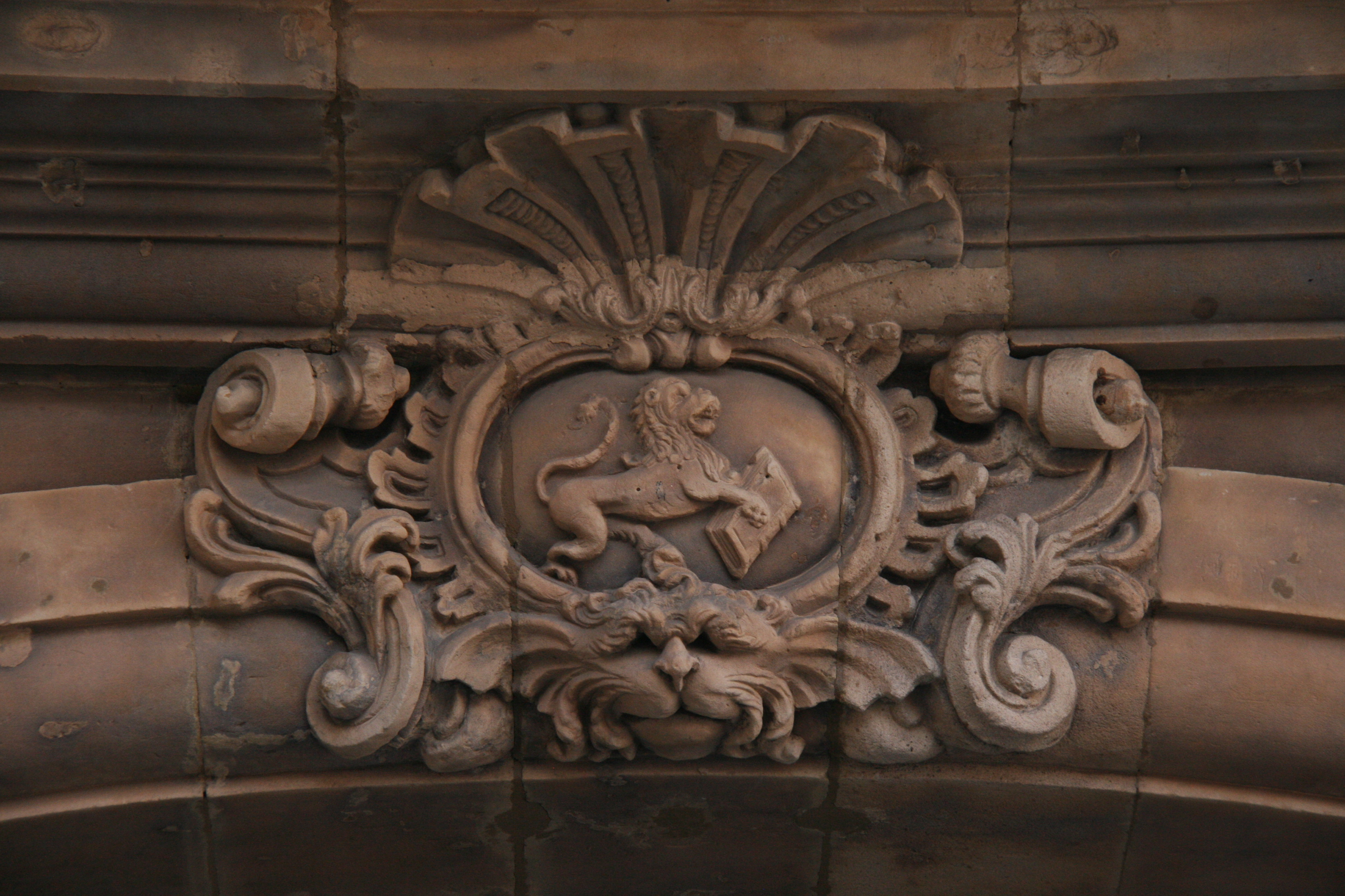 La Real Clerecía de San Marcos que posee las casas sobre la calle tutor (sobre la dovela del arco mayor de la calle tutor puede verse el León de San Marcos)